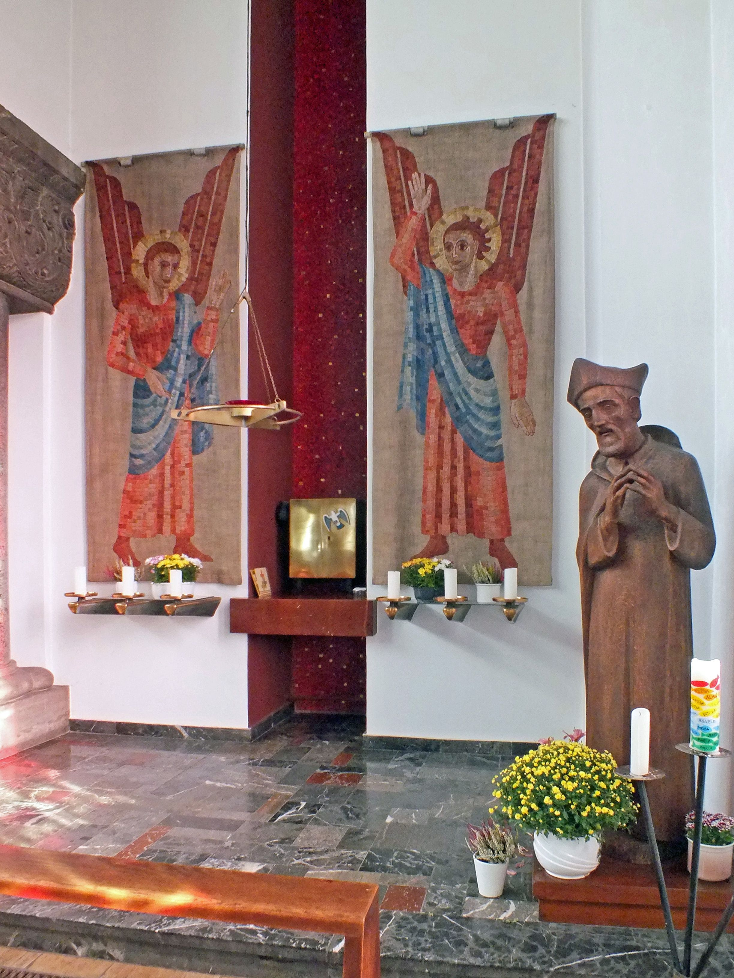 Sakramentsaltar mit Neri-Statue in der Liebfrauenkirche Leipzig-Lindenau